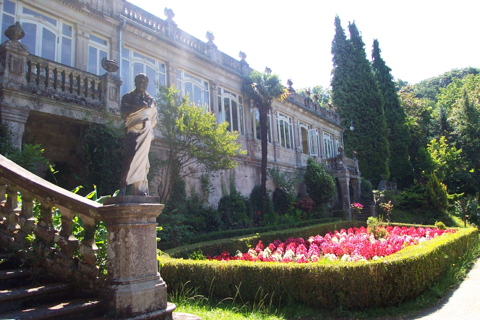 Palacio de Lourizán. O Pazo de Lourizán está situado no lugar de Erbalonga da parroquia de Santo Andrés de Lourizán do concello de Pontevedra.